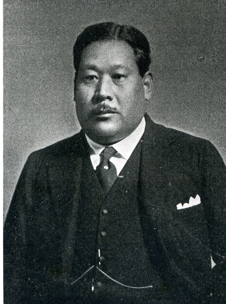 この写真は、一瀬一二（1881-1935）の写真です。